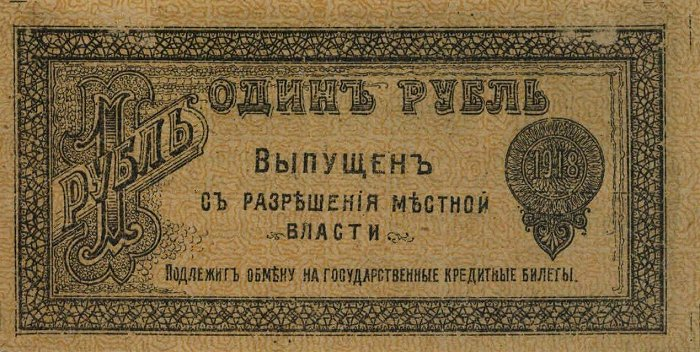 Оренбургское отделение Госбанка. Денежный знак 1 рубль. Реверс.